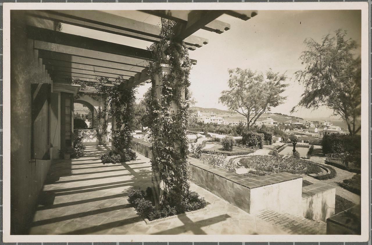 Terrassa amb pèrgola i primitius jardins del xalet de la Senya Blanca (S'Agaró) obra de Rafael Masó i Valentí.